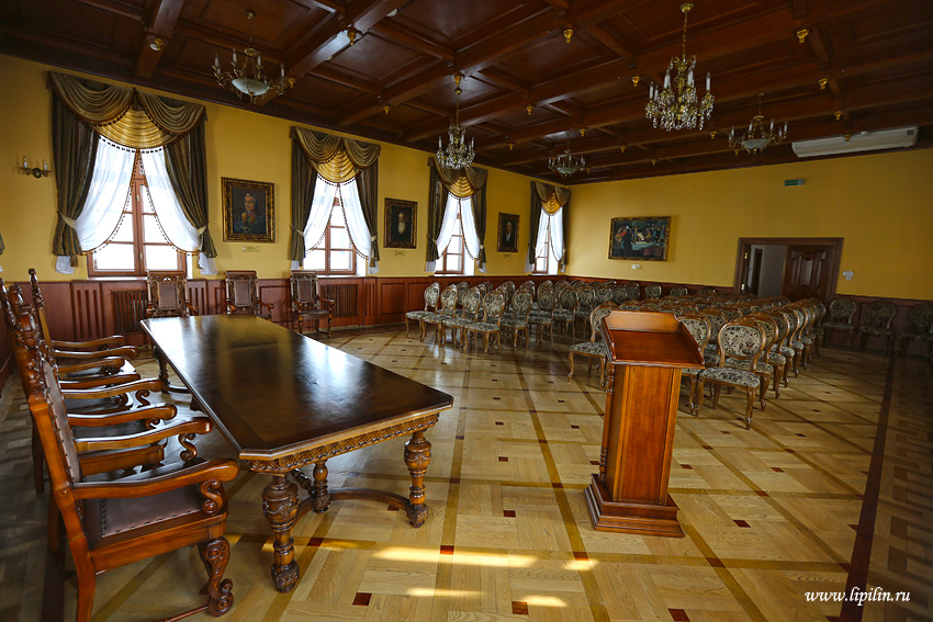 Магілёў. Інтэр'ер ратушы